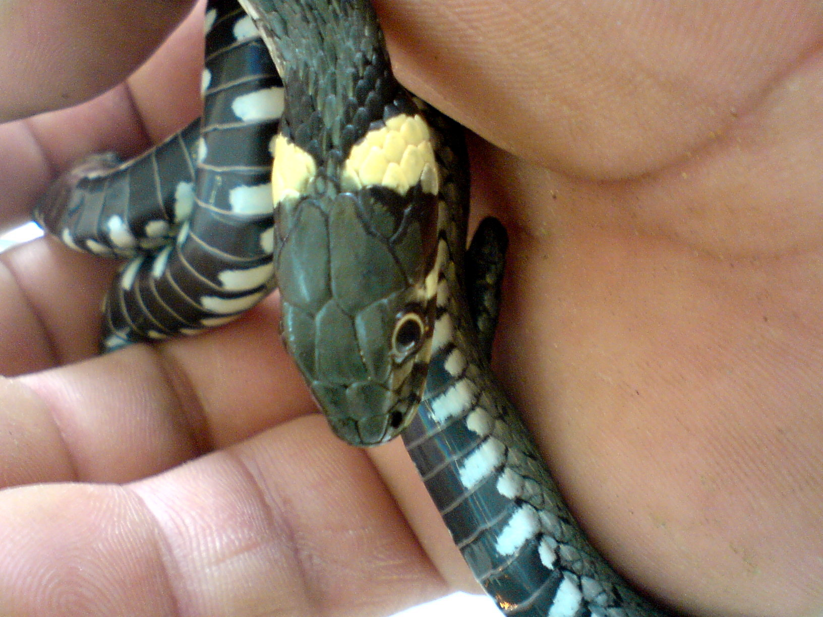 Młody zaskroniec